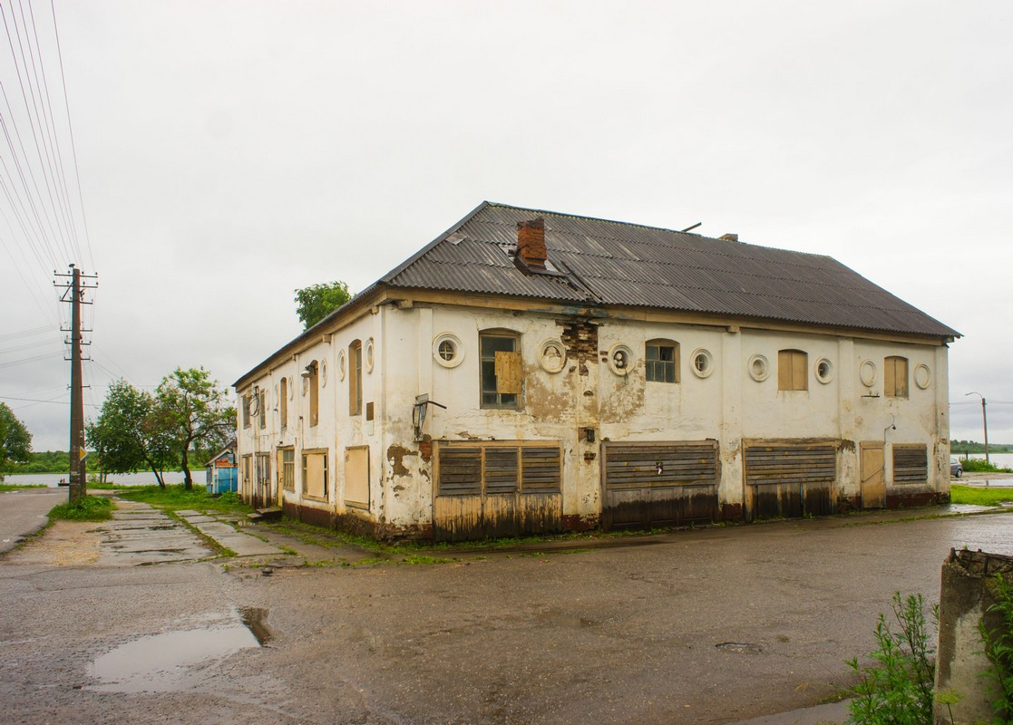 Торговые ряды: улица Победы, 3, Каргополь, Каргопольский район, Архангельская область